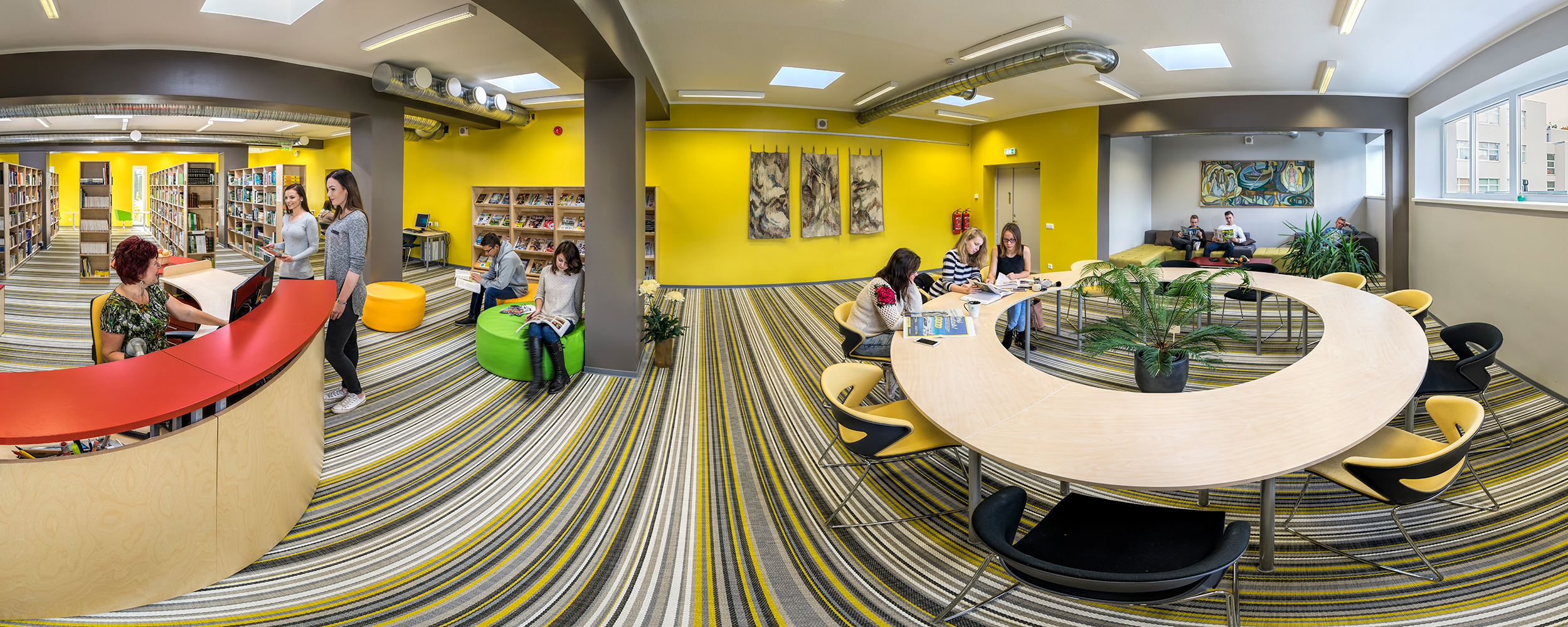 Räpina Aianduskooli raamatukogu